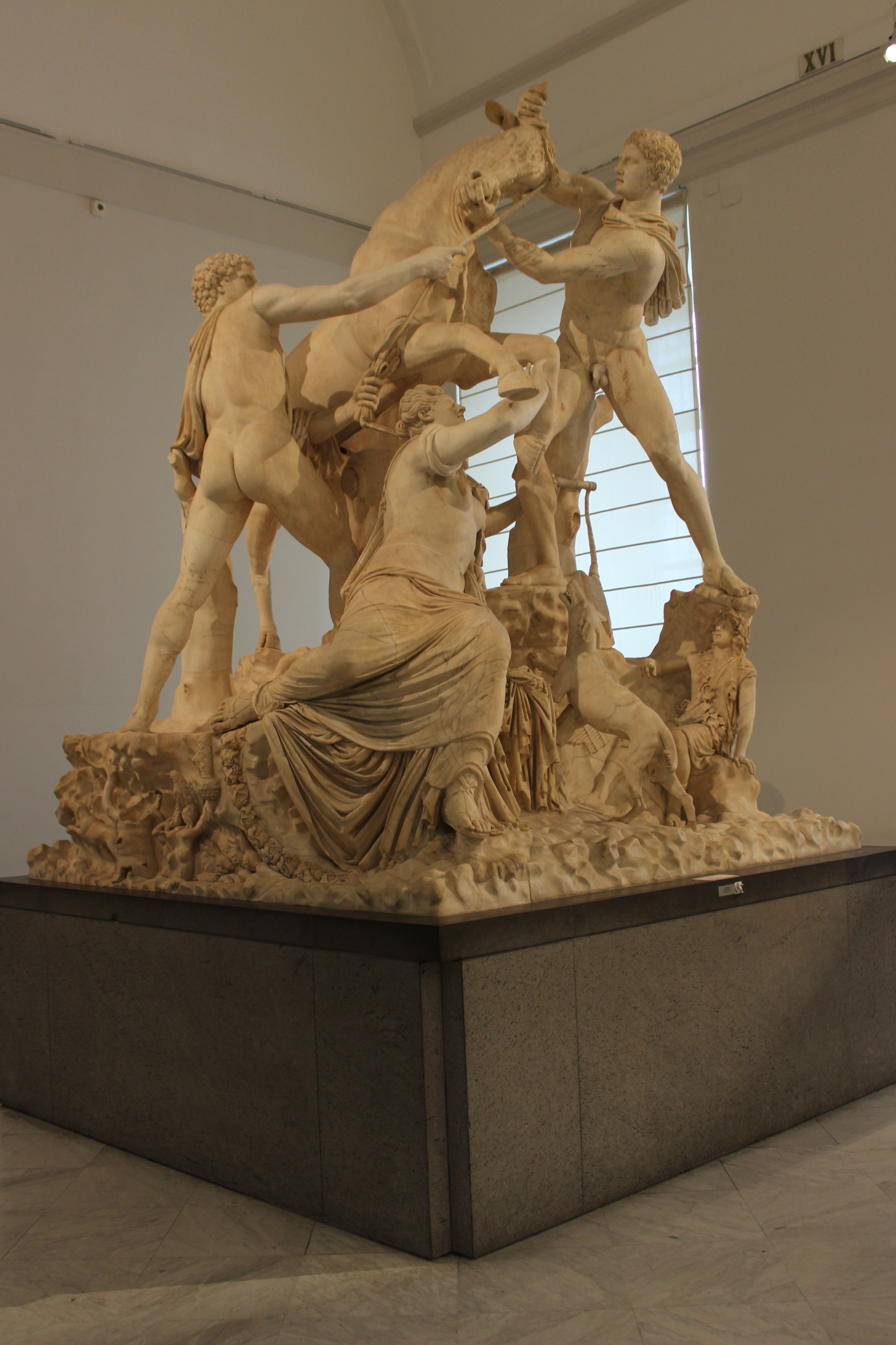 Nápoles. Museo Archeologico Nazionale. Toro Farnese.